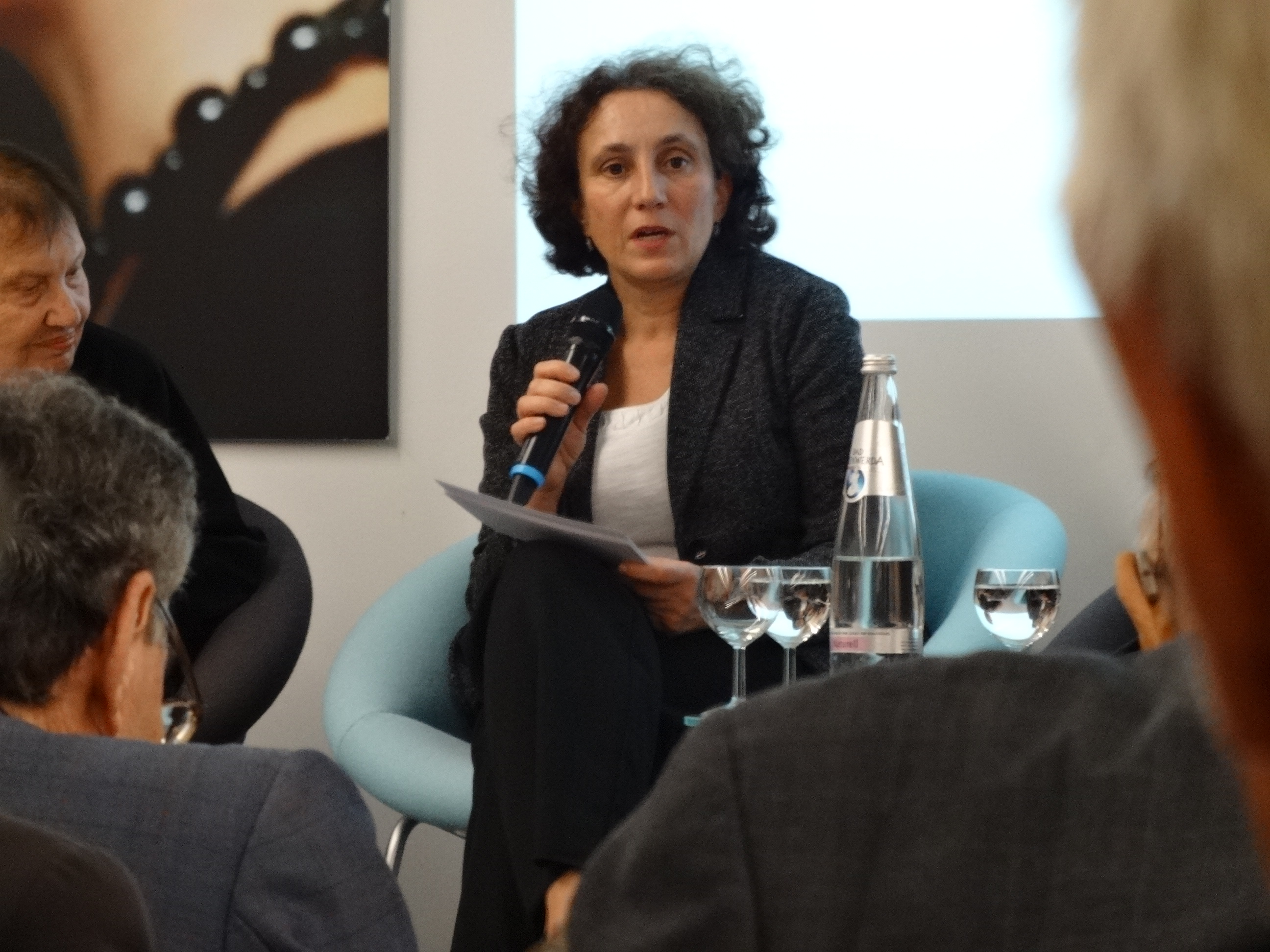 Journalistin Gemma Pörzgen auf einer Podiumsdiskussion in der Stiftung EVZ in Berlin-Kreuzberg, September 2014